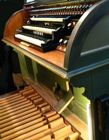 Description: Schwarz-Orgel von 1900/1901: Spieltisch Source: User:Saberhagen Location: Salemer Münster, Salem (Baden), Germany Source: own photograph by uploader